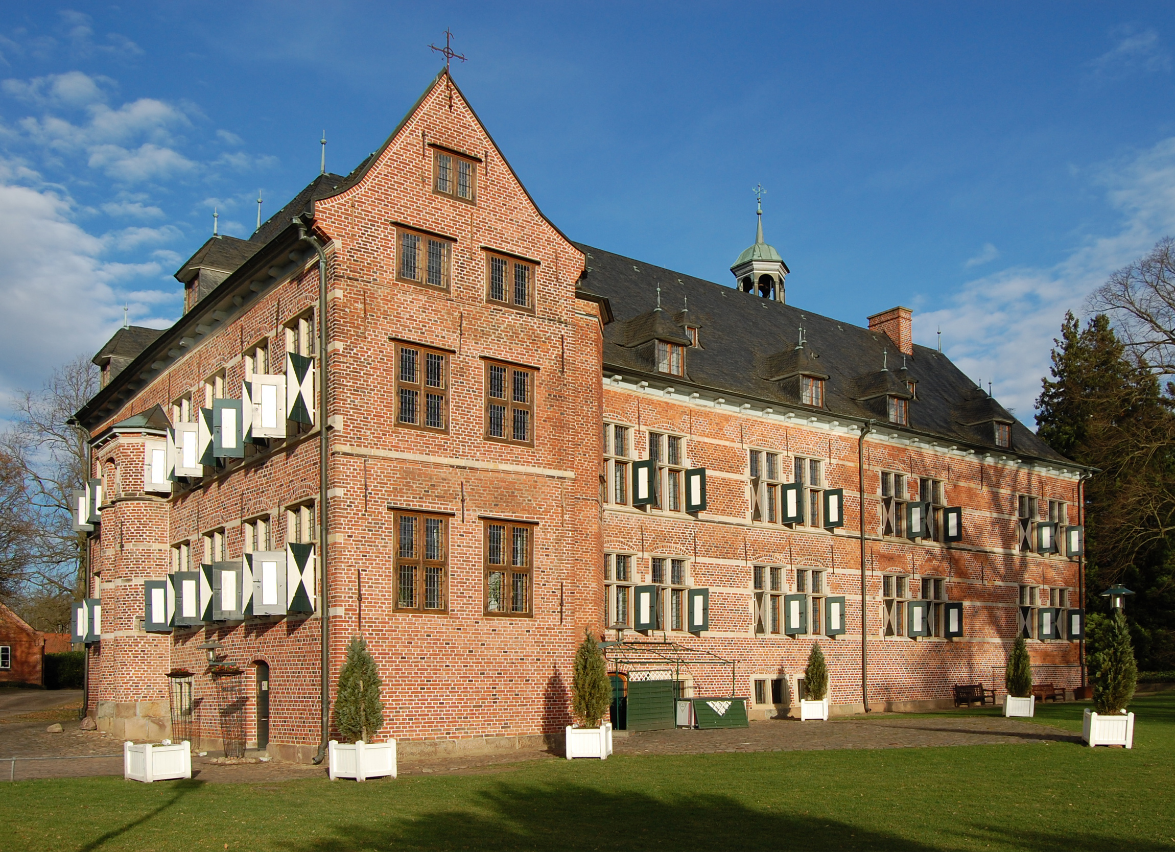 Das Reinbeker Schloss